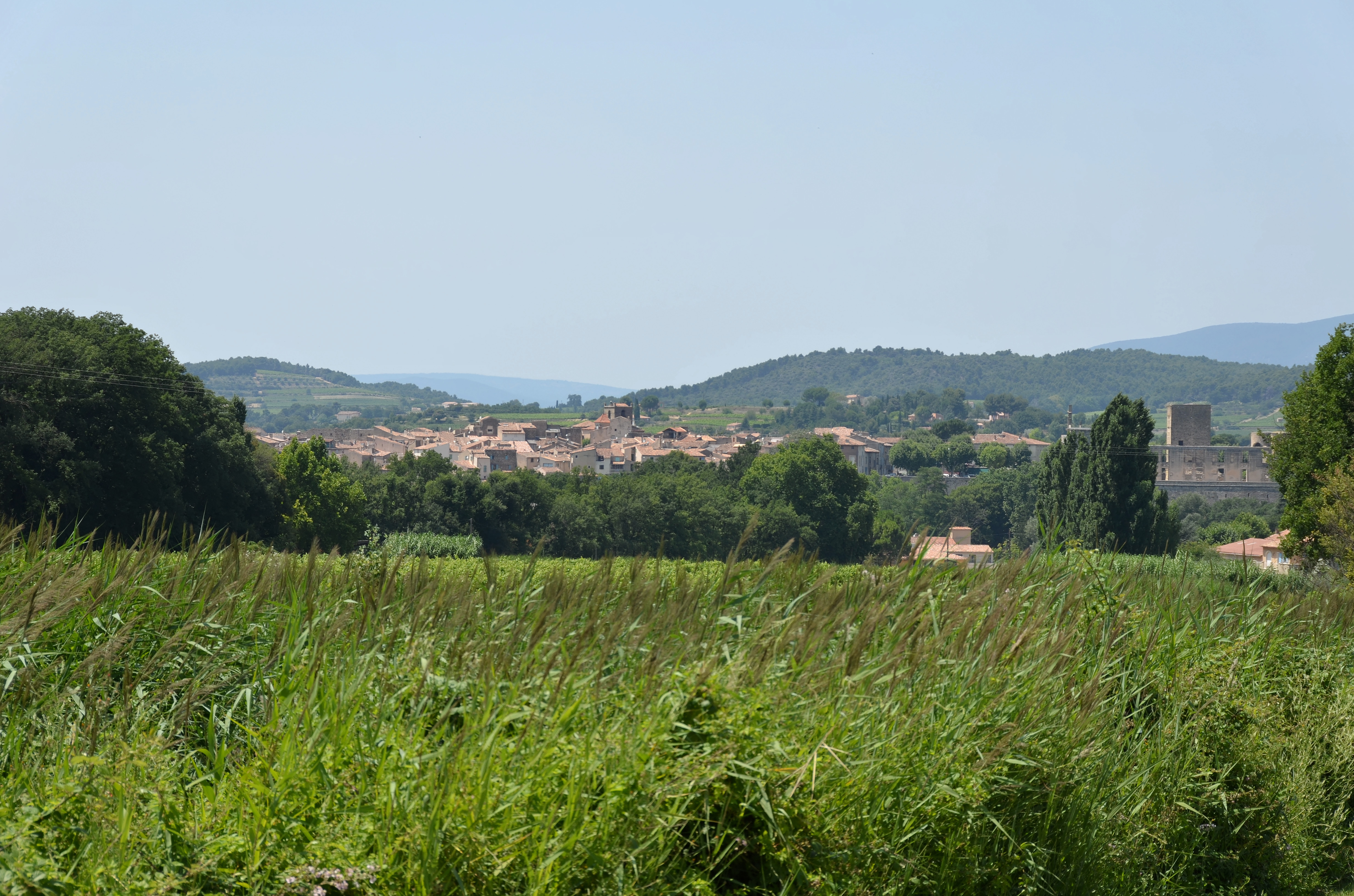 Vue de La Tour d'Aigues, Vaucluse (84), France